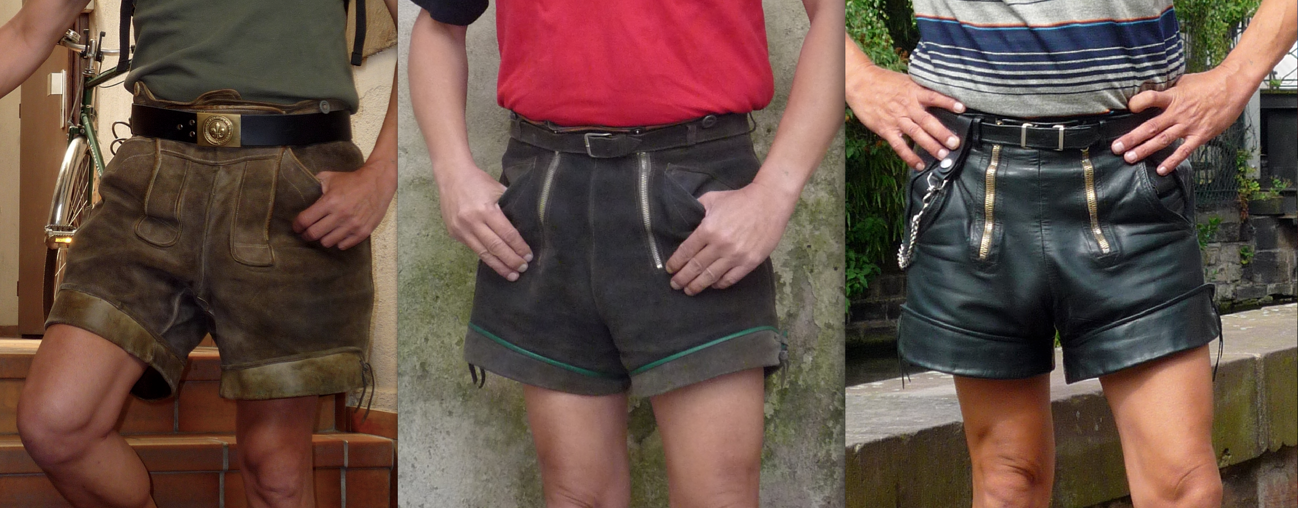 Kurze Lederhosen, culottes de cuir courtes des années 1930 à 1960. De gauche à droite : Lederhose traditionnelle des années trente à pont boutonné. Sepplhose à pont à fermetures à glissières. Glattlederhose en cuir vert-olive foncé brillant de la génération Lederhosen.